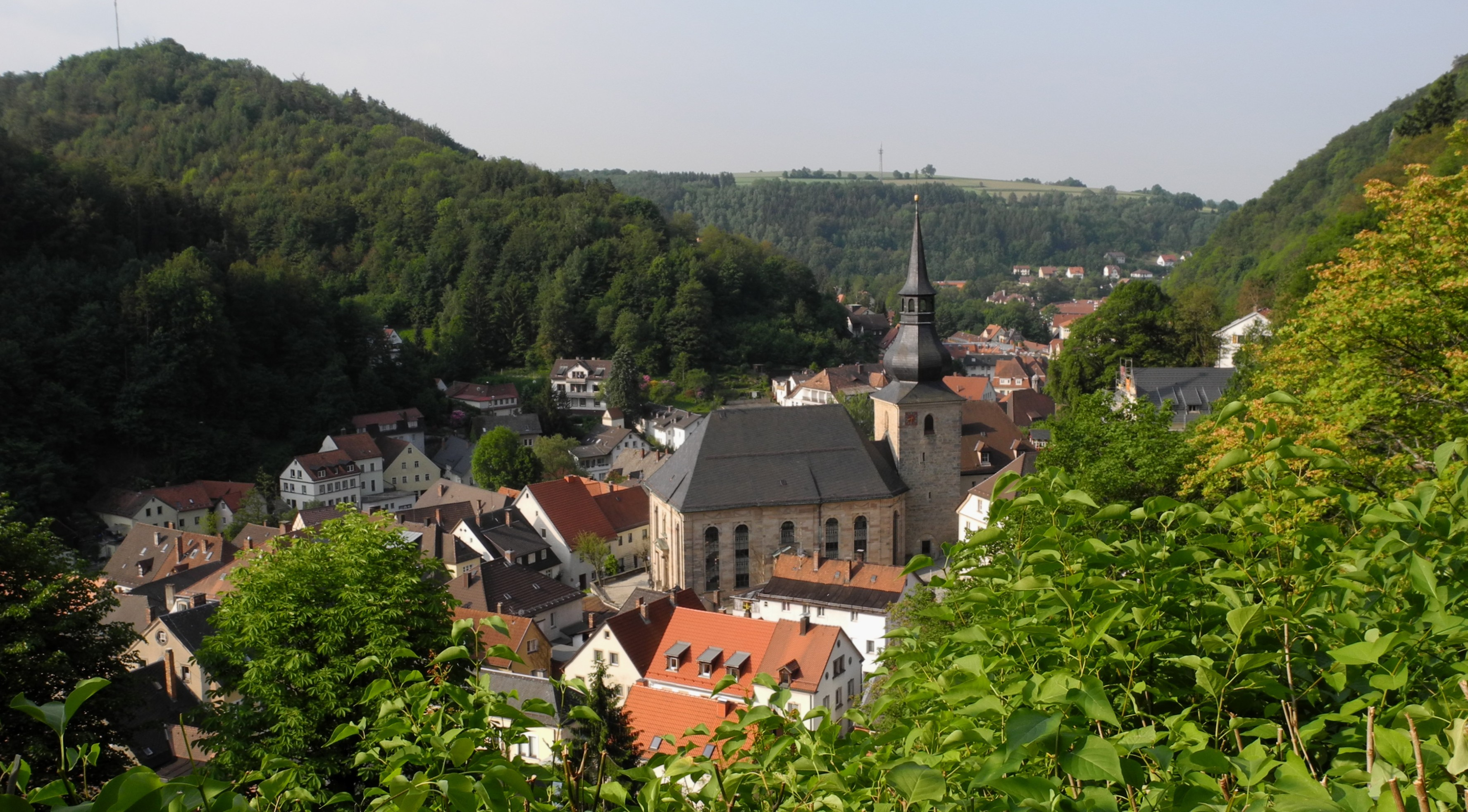 Bad Berneck im Fichtelgebirge, Sicht vom Burgturm, evangelisch-lutherische Pfarrkirche